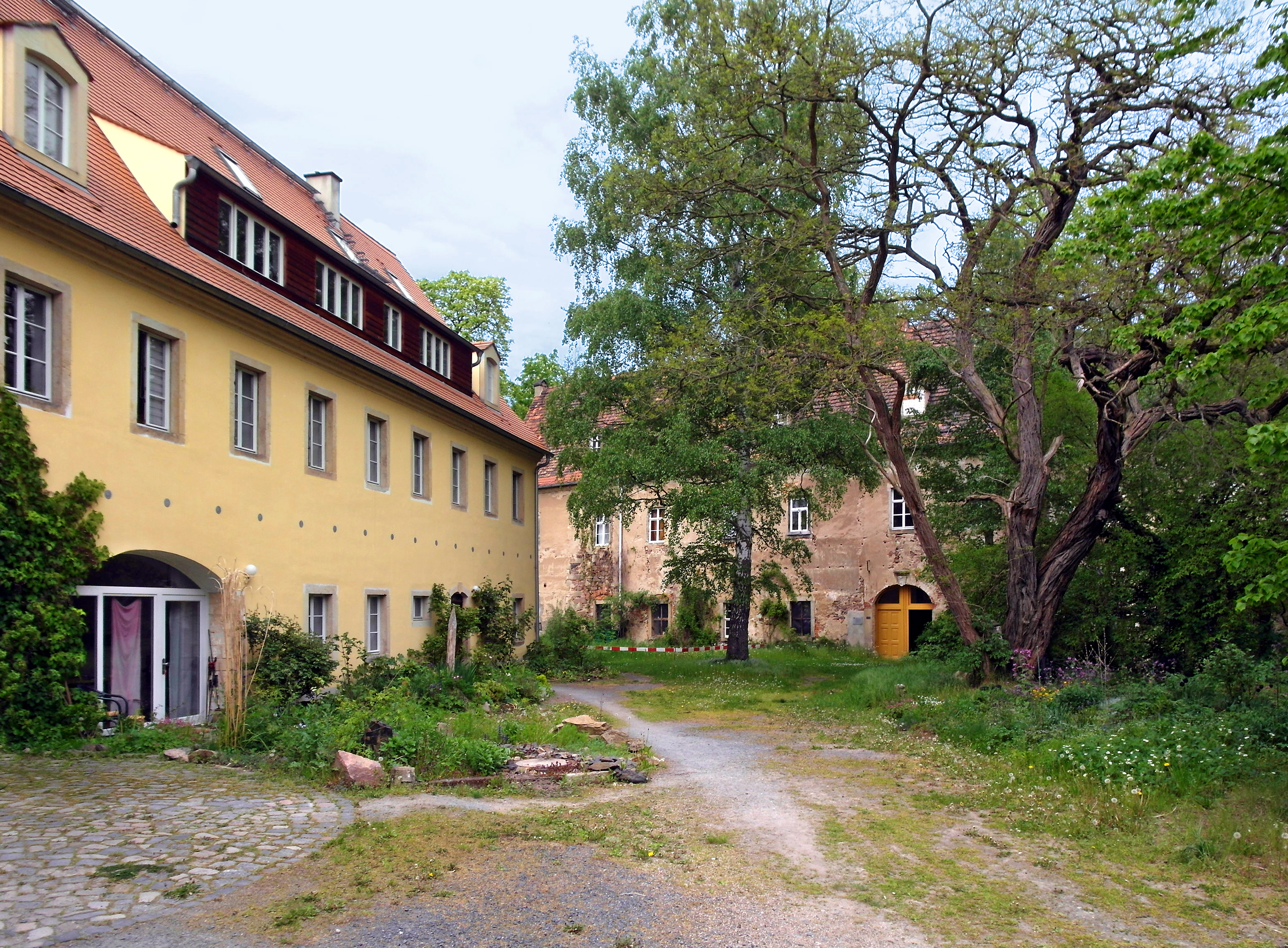 12.05.2017 12.05.2017 01594 Jahnishausen (Riesa), Jahnatalstraße 4 (GMP: 51.273662,13.285343): Großes Rittergut und Schloß mit bedeutender Geschichte, zeitweise in königlichem Besitz. In der DDR war das Rittergut ein Volksgut. Im Schloß waren bis 1969 Schule und Kinderhort. Nach Jahren des Verfalls erwarben 2001 sieben Frauen die verwahrloste Immobilie, um hier ein generationsübergreifendes Wohn- und Lebensprojekt zu verwirklichen. Sie gründeten eine Genossenschaft, die Gut Jahnishausen eG, und die Gemeinschaft Lebenstraum Jahnishausen. Gemeinsam treiben sie die schwierige Sanierung voran. Blick vom Torhaus (links) zum Schloß. [SAM9867.JPG]20170512520DR.JPG(c)Blobelt